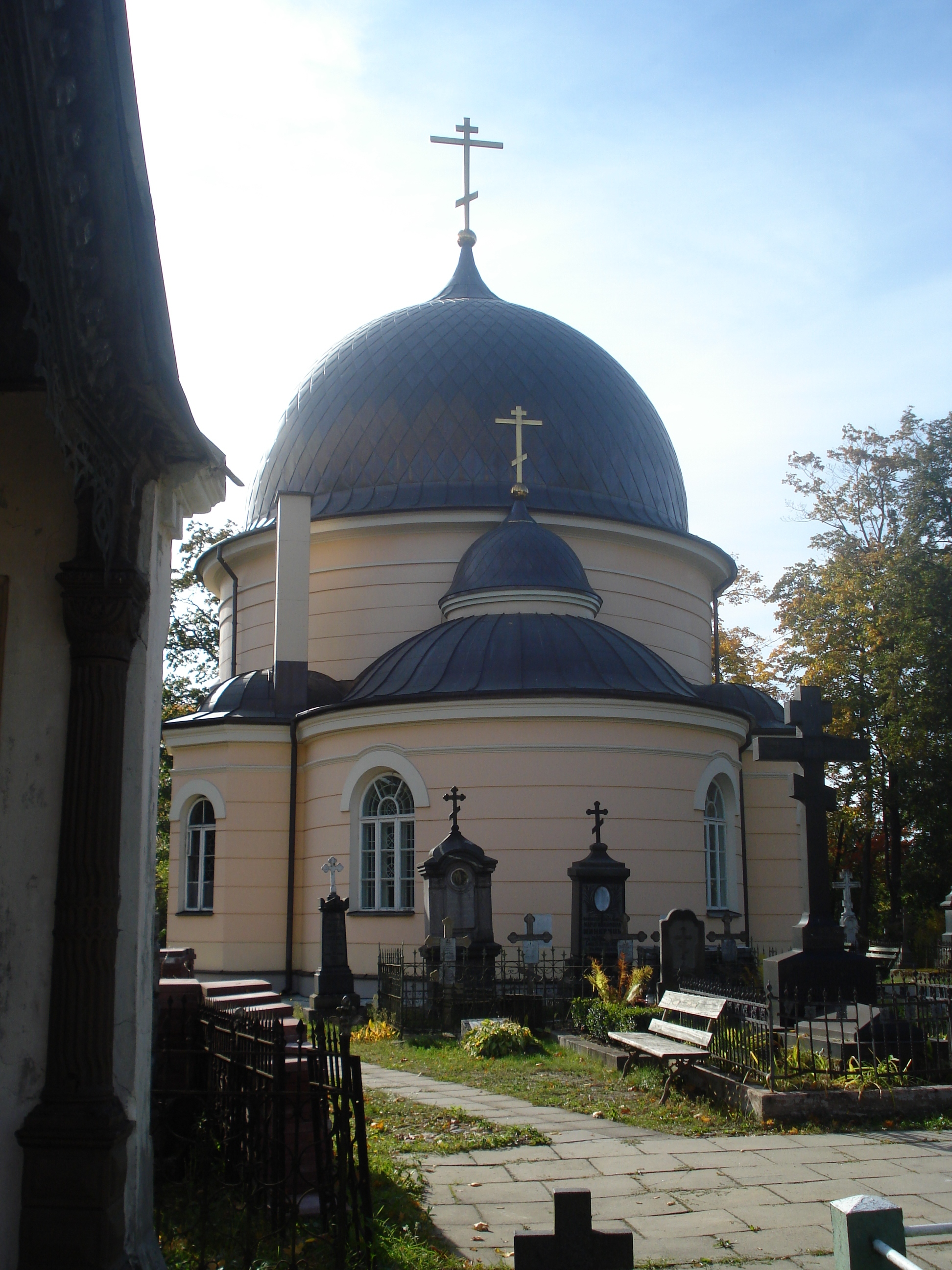 Orthodox Church of Saint Euphrosyne in Vilnius (Liepkalnių g.)